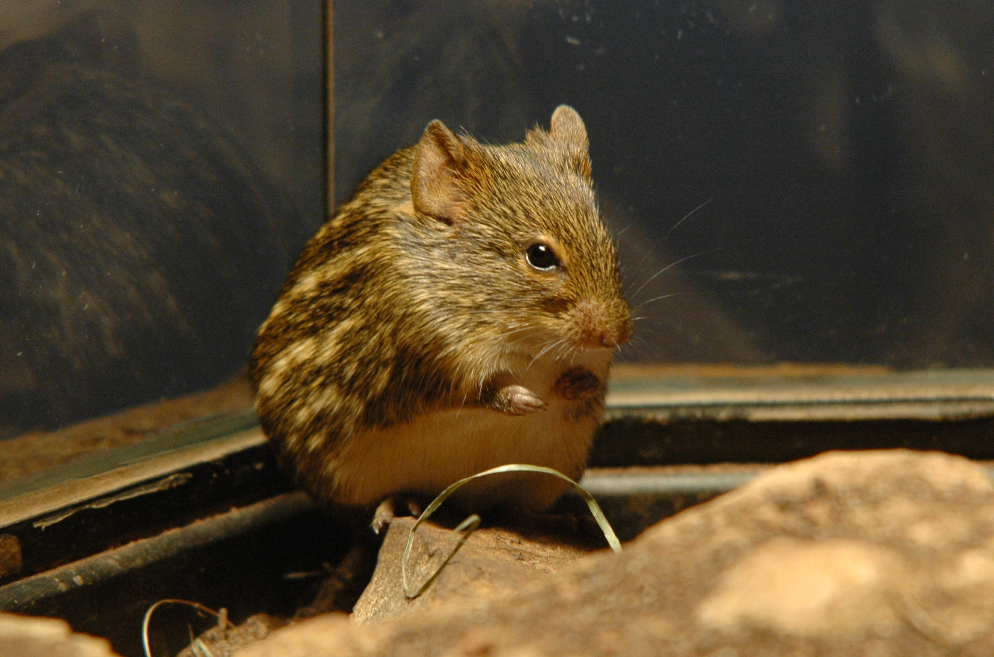 Lemniscomys striatus, Zoo Leipzig